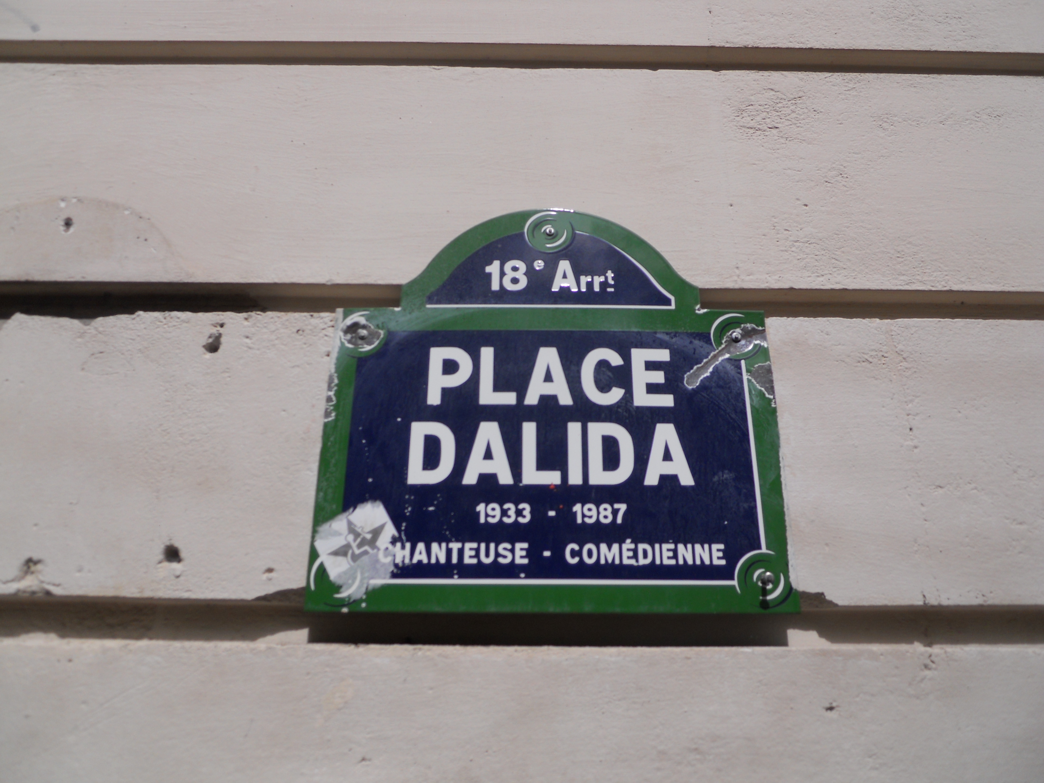 Insegna sulla piazza dedicata a Dalida, a Montmartre